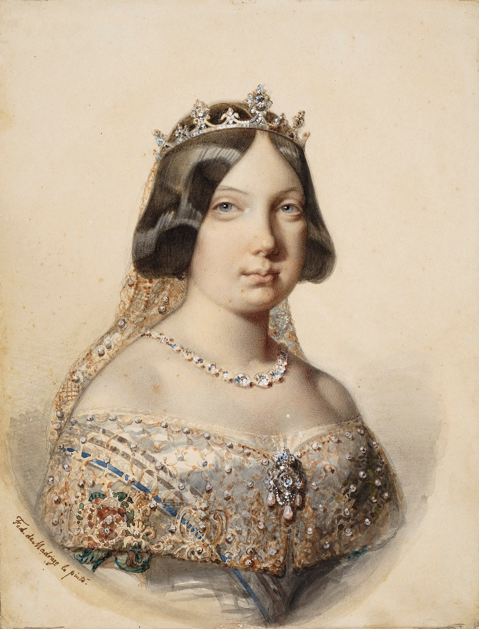 Retrato de la reina Isabel II de España, que fue hija del rey Fernando VII y de la reina María Cristina de Borbón-Dos Sicilias.